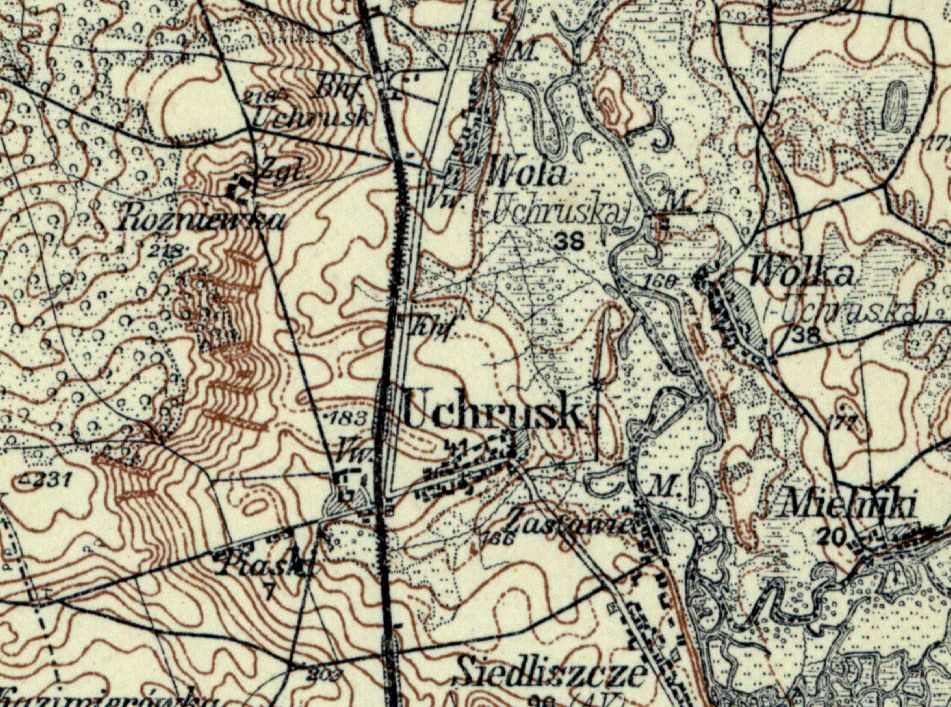 Uhrusk (pow. chełmski) na mapie Rosji Zachodniej (Karte des westlichen Rußlands) z 1915 r.